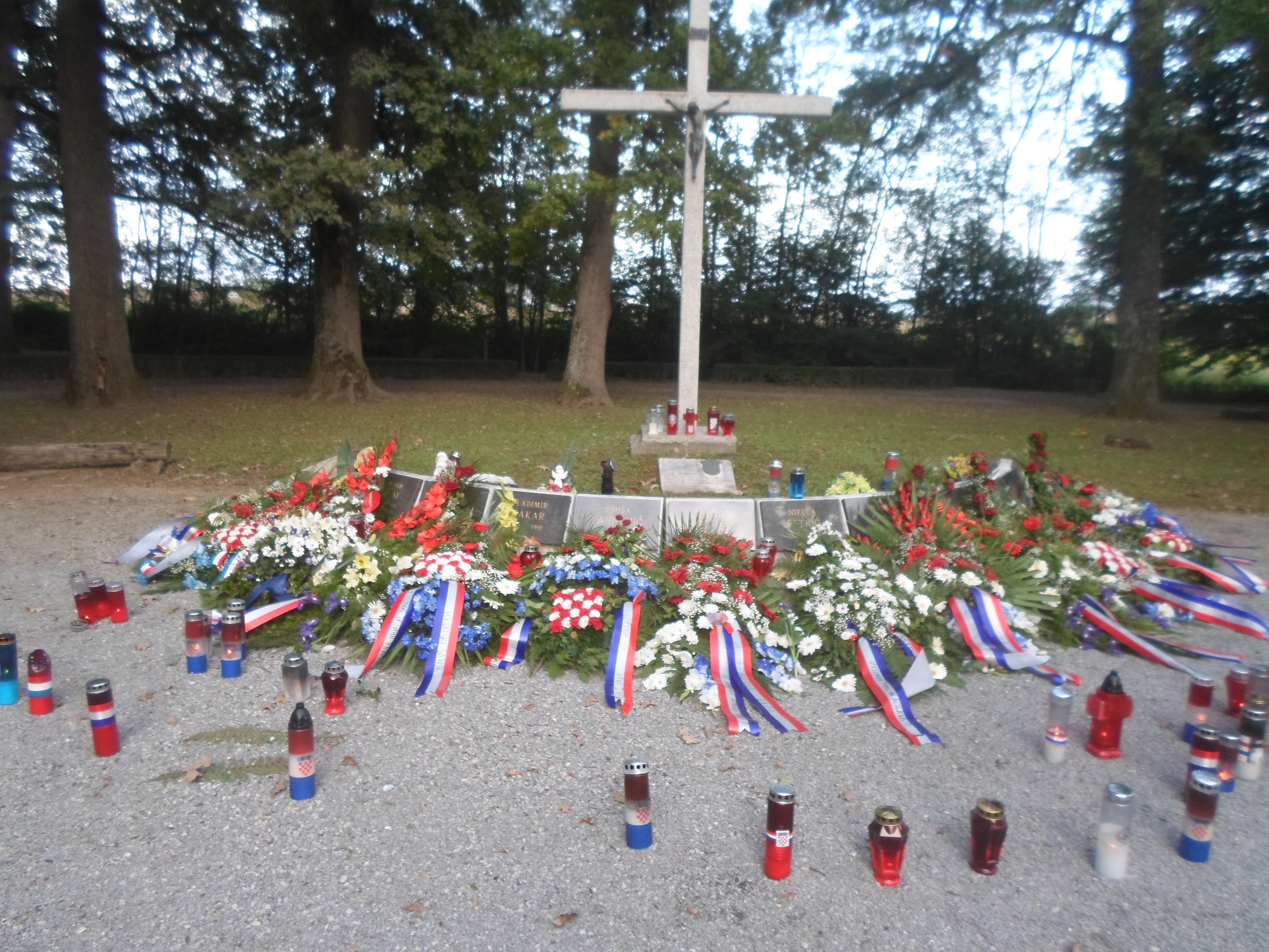 Barutana Bjelovar, Spomenik Hrvatskim vojnicima